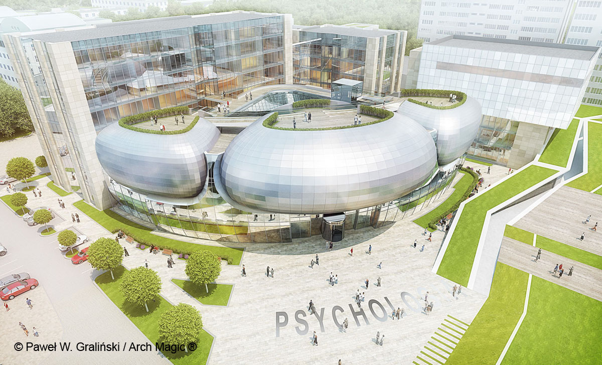 projekt budynku Wydziału Psychologii Uniwersytetu Warszawskiego